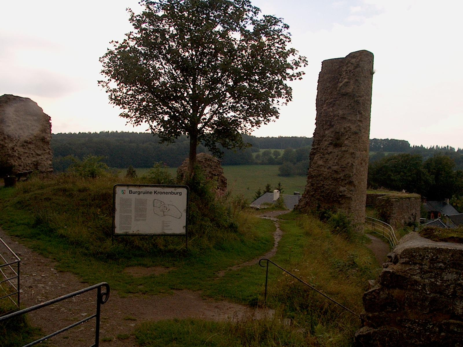 Burgruine Kronenburg, Kreis Euskirchen